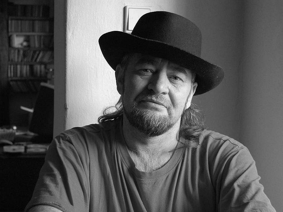 Miloš Mlha Uhrin - moravský malíř